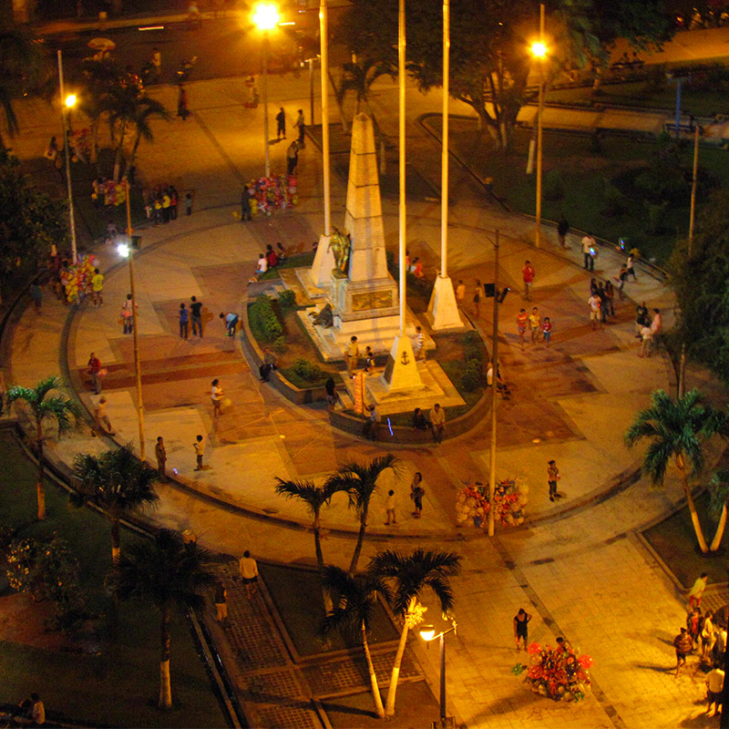 Zona del obelisco de la Plaza de Armas de Iquitos